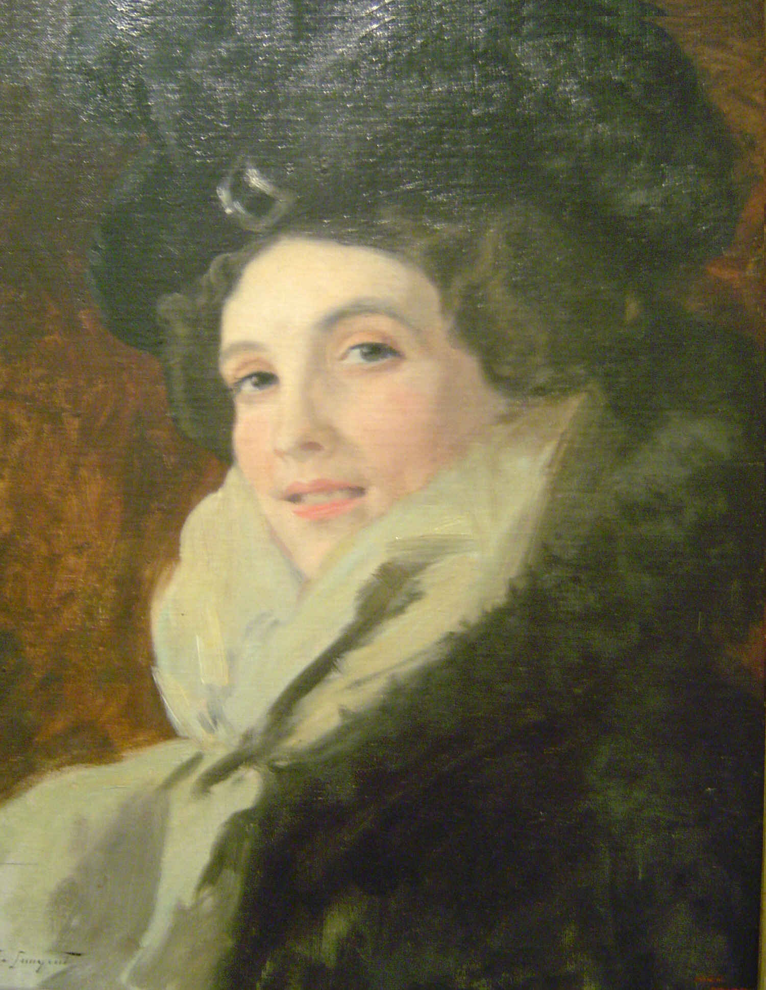 Retrat d'un dona jove amb vestit i sombrer i mocador al coll blanc. Va enmarcat